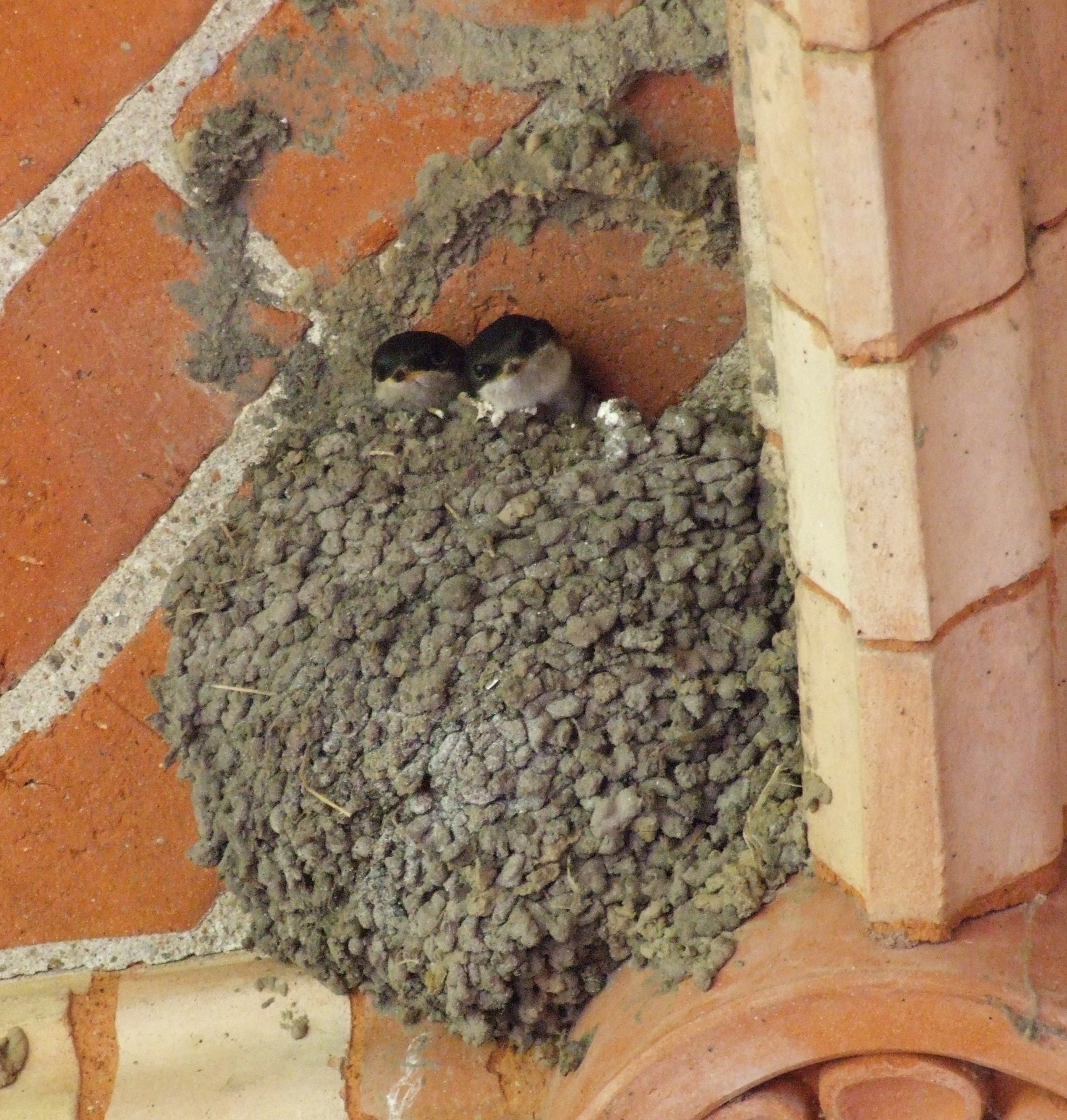 Zwei junge Mehlschwalben (Delichon urbica - House Martins) im Nest, im Schweriner Schloss, Deutschland